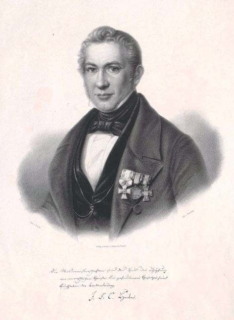 Justus F. C. Hecker (1795–1850)